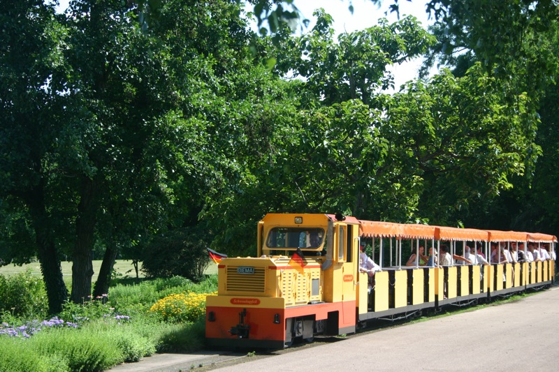 Diesel train (Schwoabapfeil) on Killesberg narrow-gauge railway (Killesbergbahn)